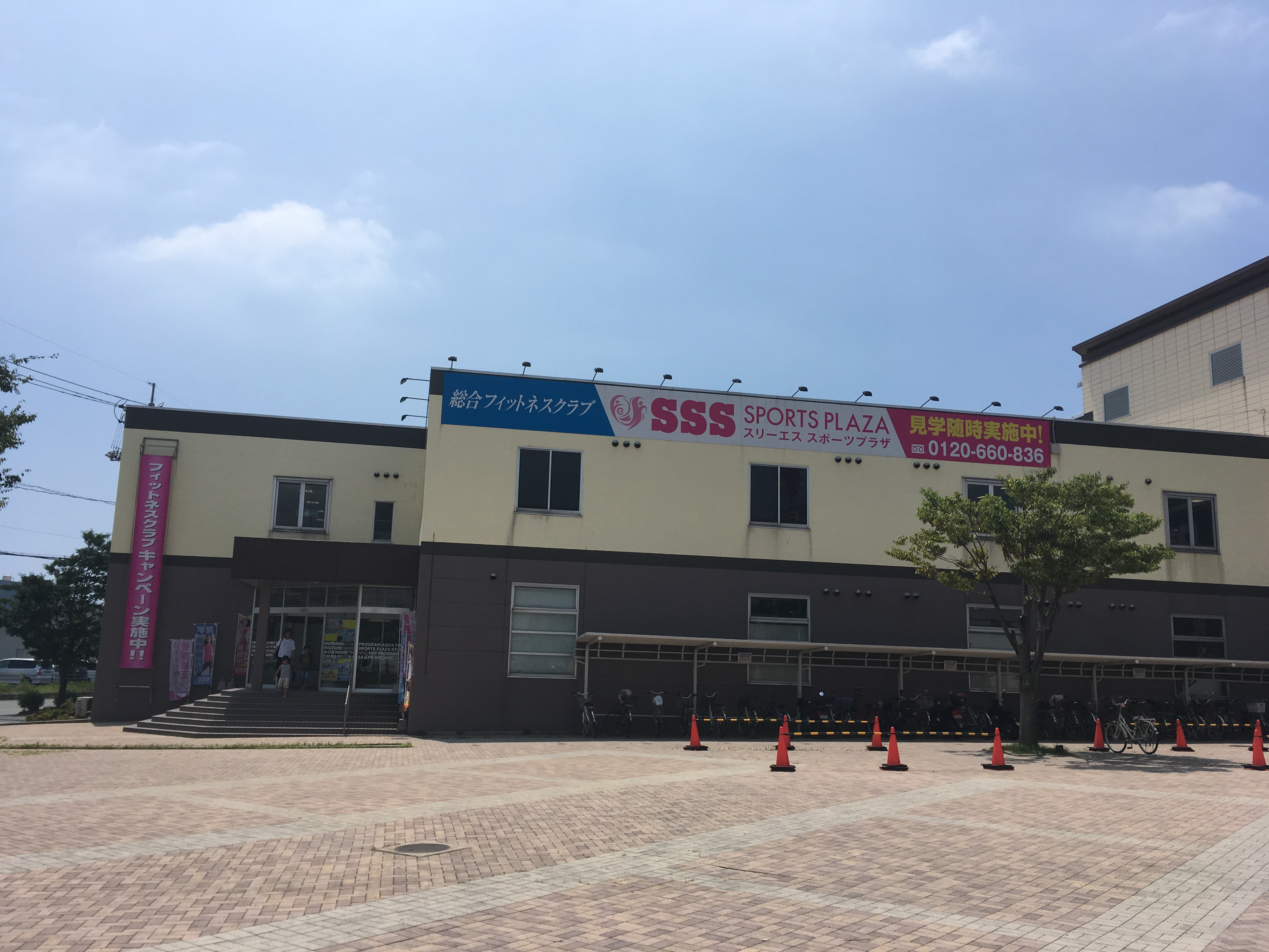 SSS宇部